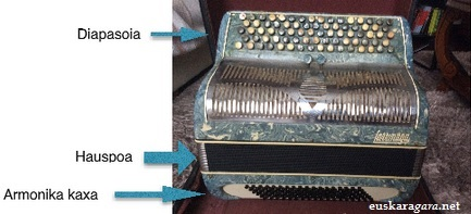 Eskusoinu edo akordeoia.